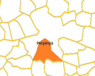 Mapa del Cantó de Perpinyà 4 elaborat a partir d'un mapa de lliure disposició